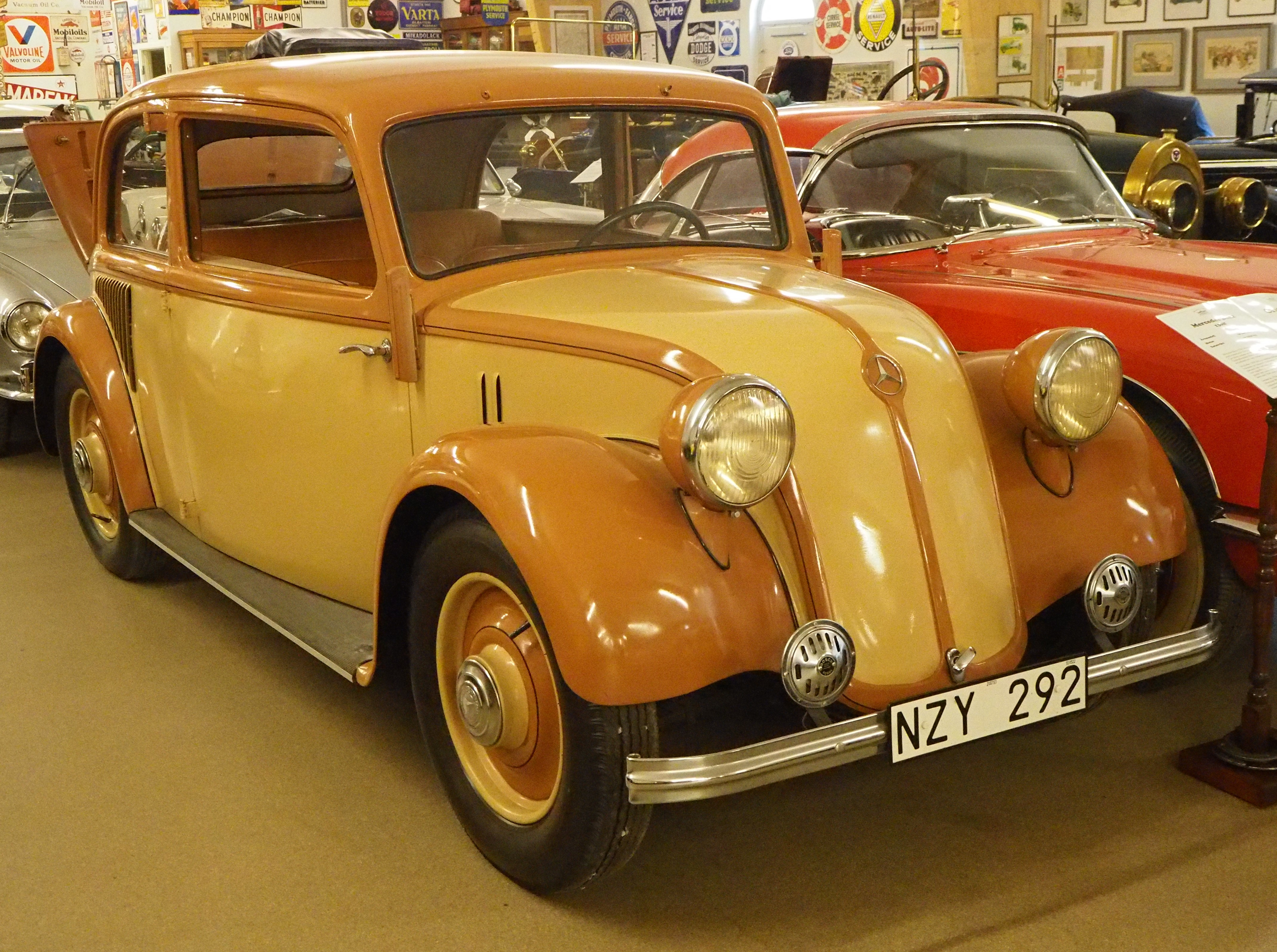 1935 Mercedes-Benz 130